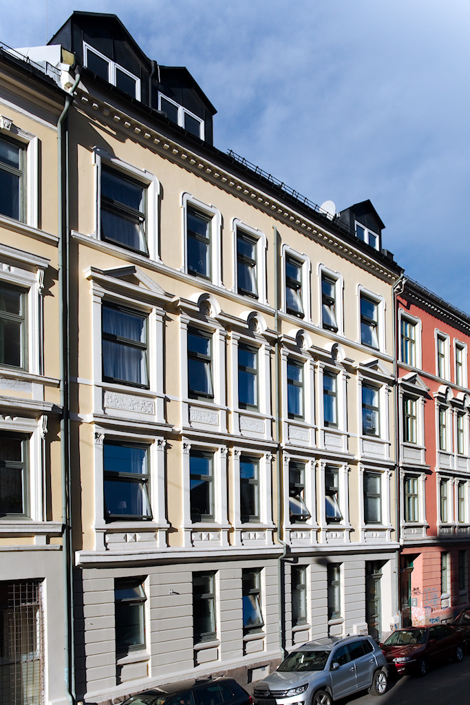 Frederik Haslunds gate 6 på Grünerløkka i Oslo